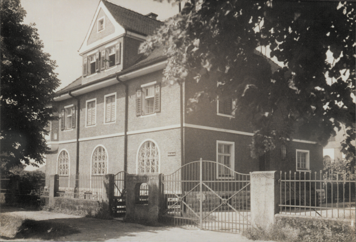 Stadtwerke Gebäude aus der Geschichte